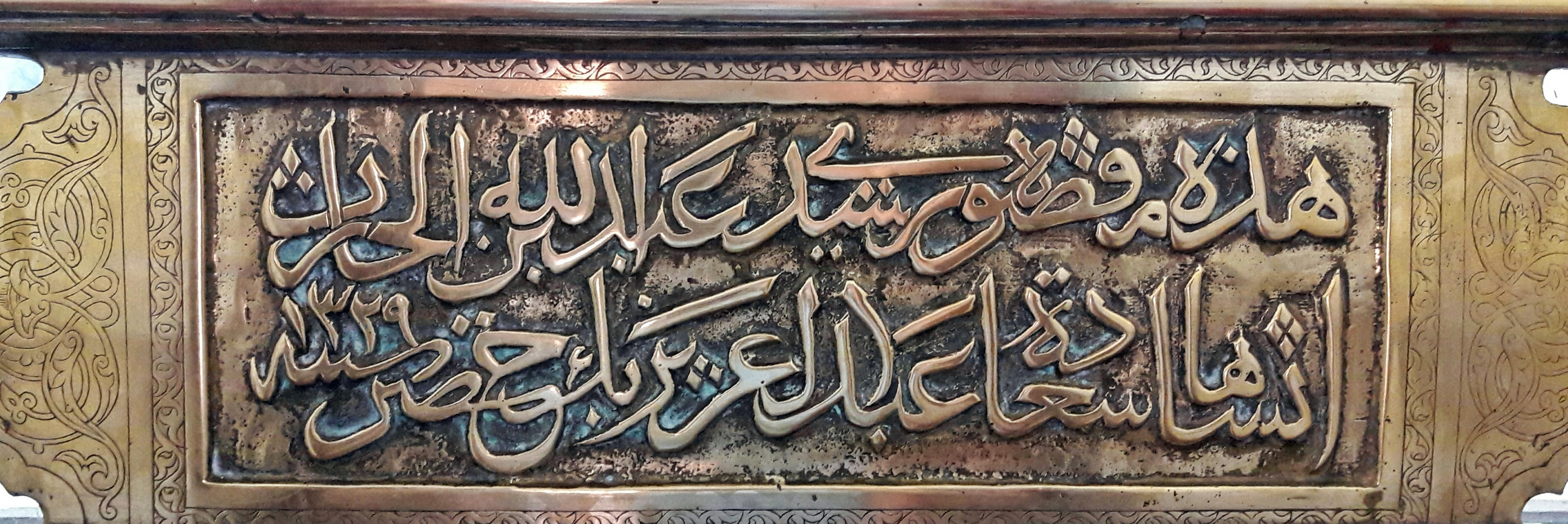 صورة للوحة مقصورة سيدنا عبد الله بن الحارث